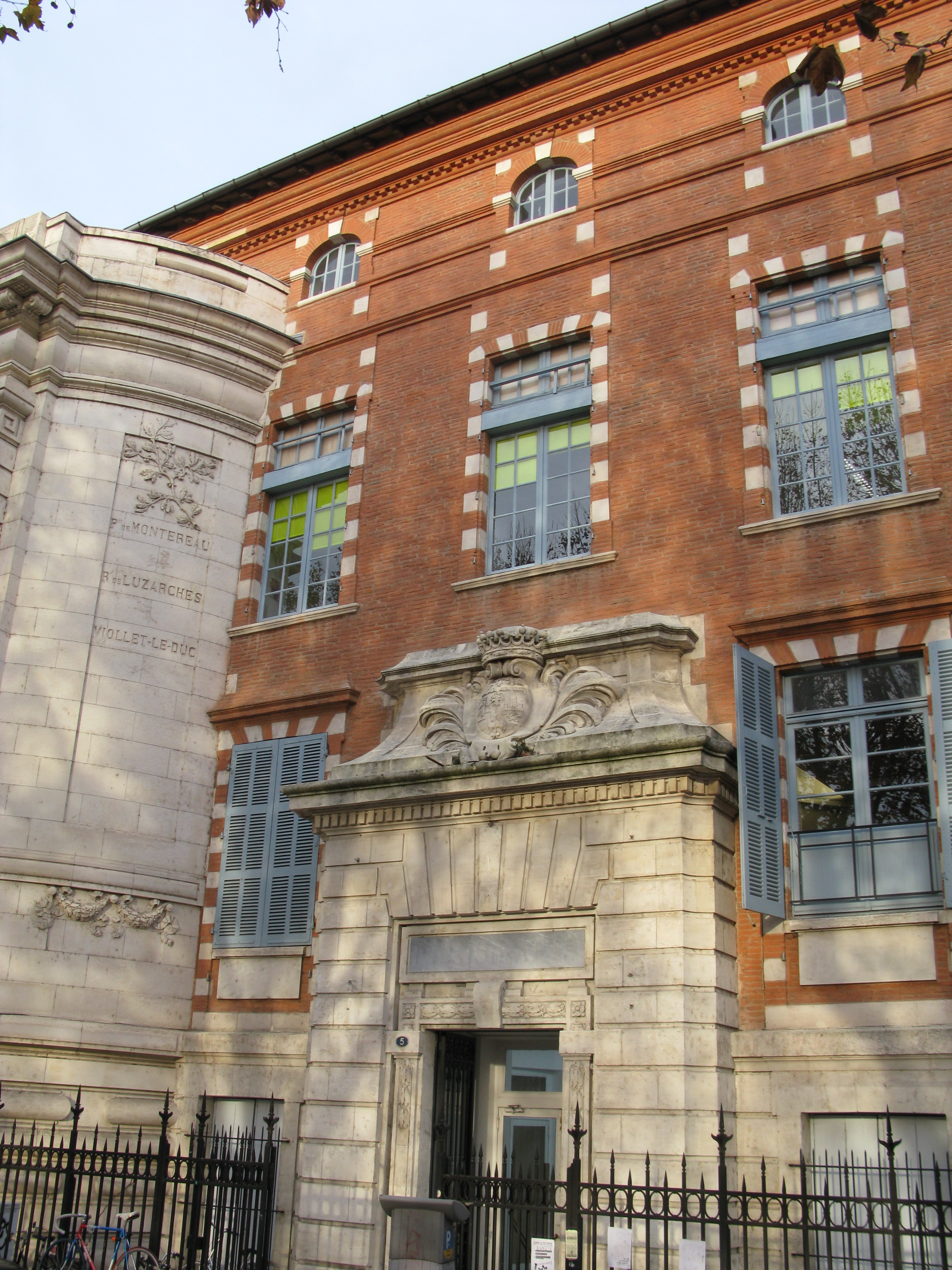 Façade du palais des arts, quai de la Daurade à Toulouse.